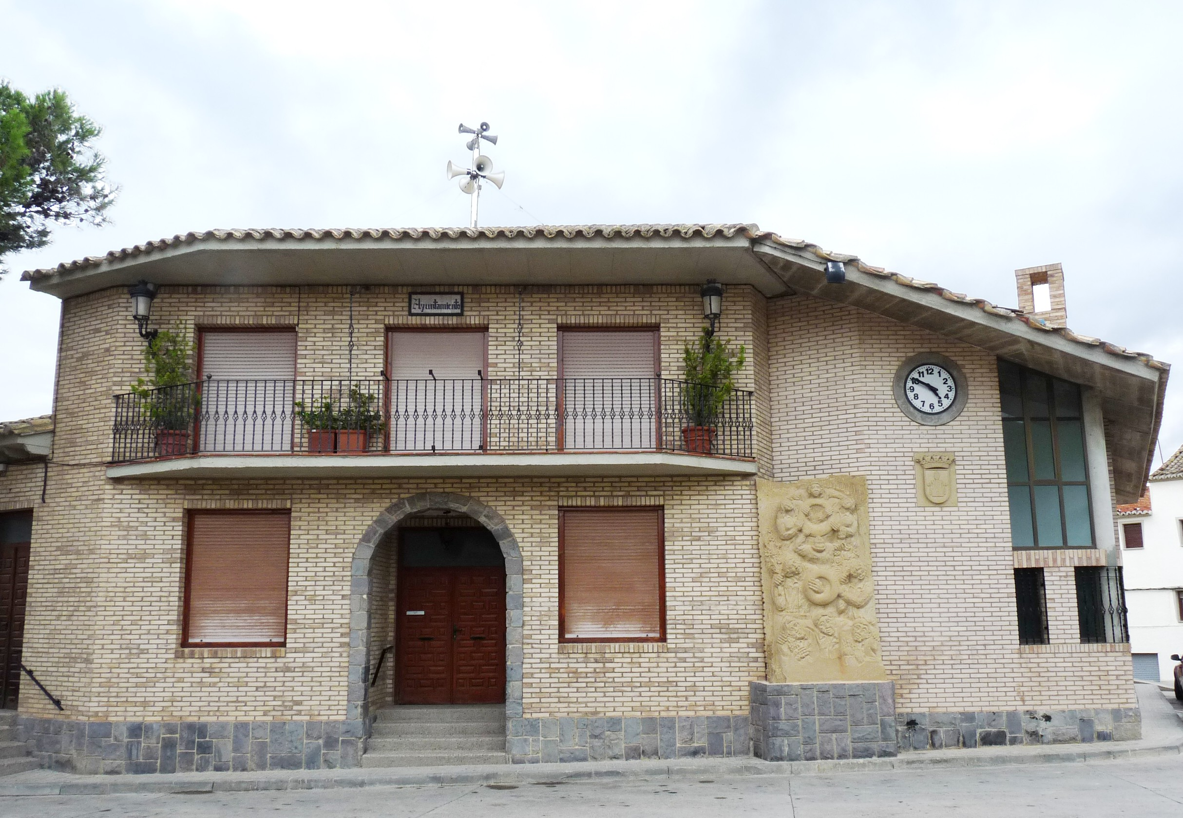 Maleján - Ayuntamiento